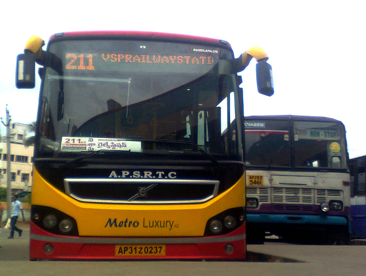 APSRTC Metro Luxury Bus at Vizianagaram